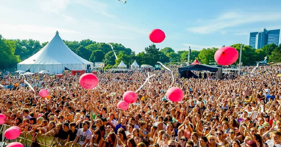 Juicy Beats Festival 2013